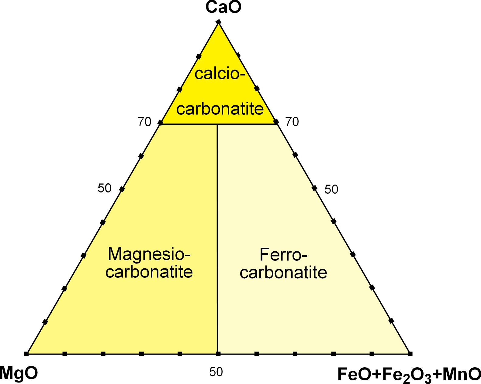 Nomenclatura carbonatiti su base chimica